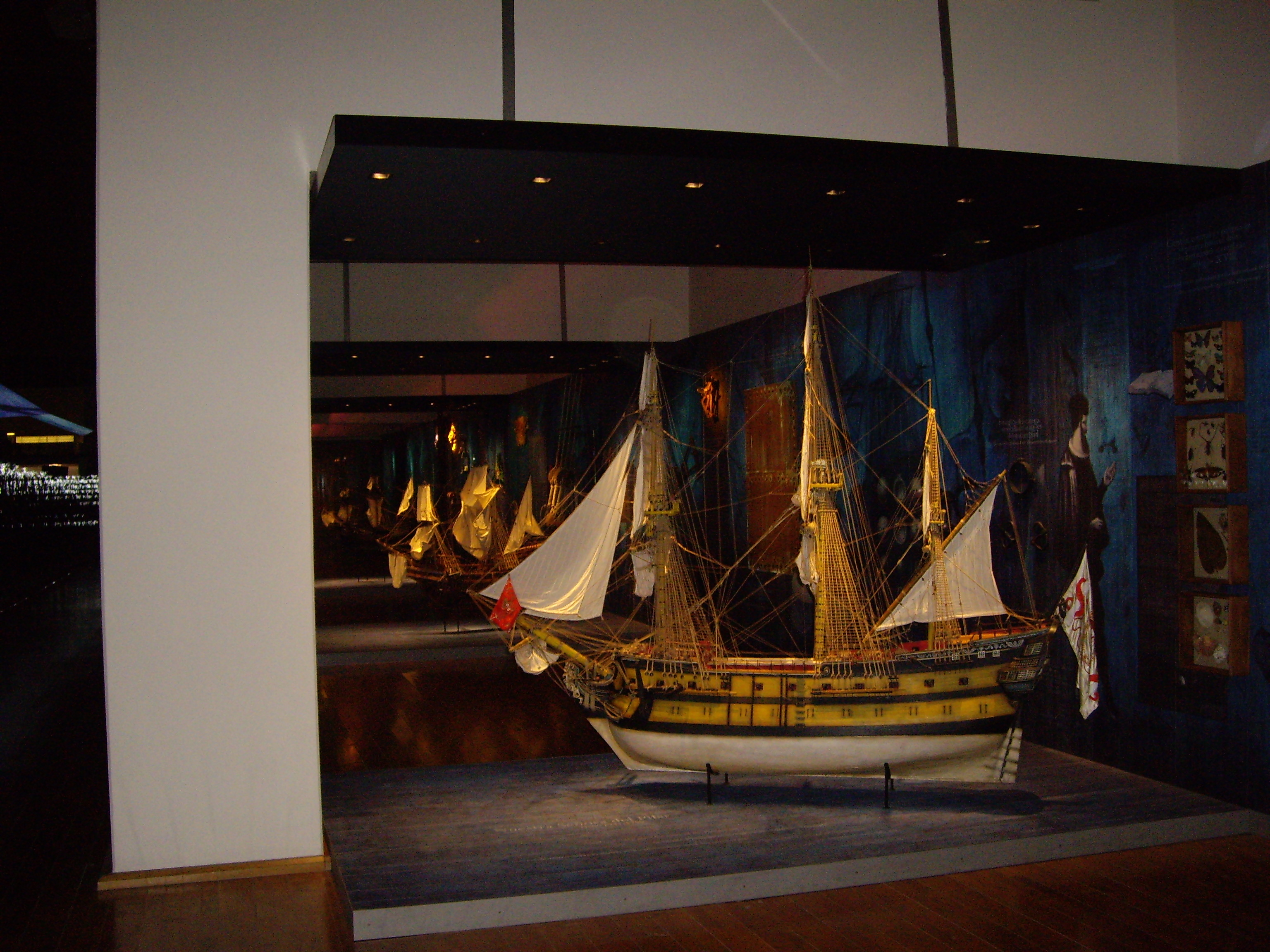 Galeón de Manila. Nuestra Señora del Pilar de Zaragoza. Siglo XVIII.